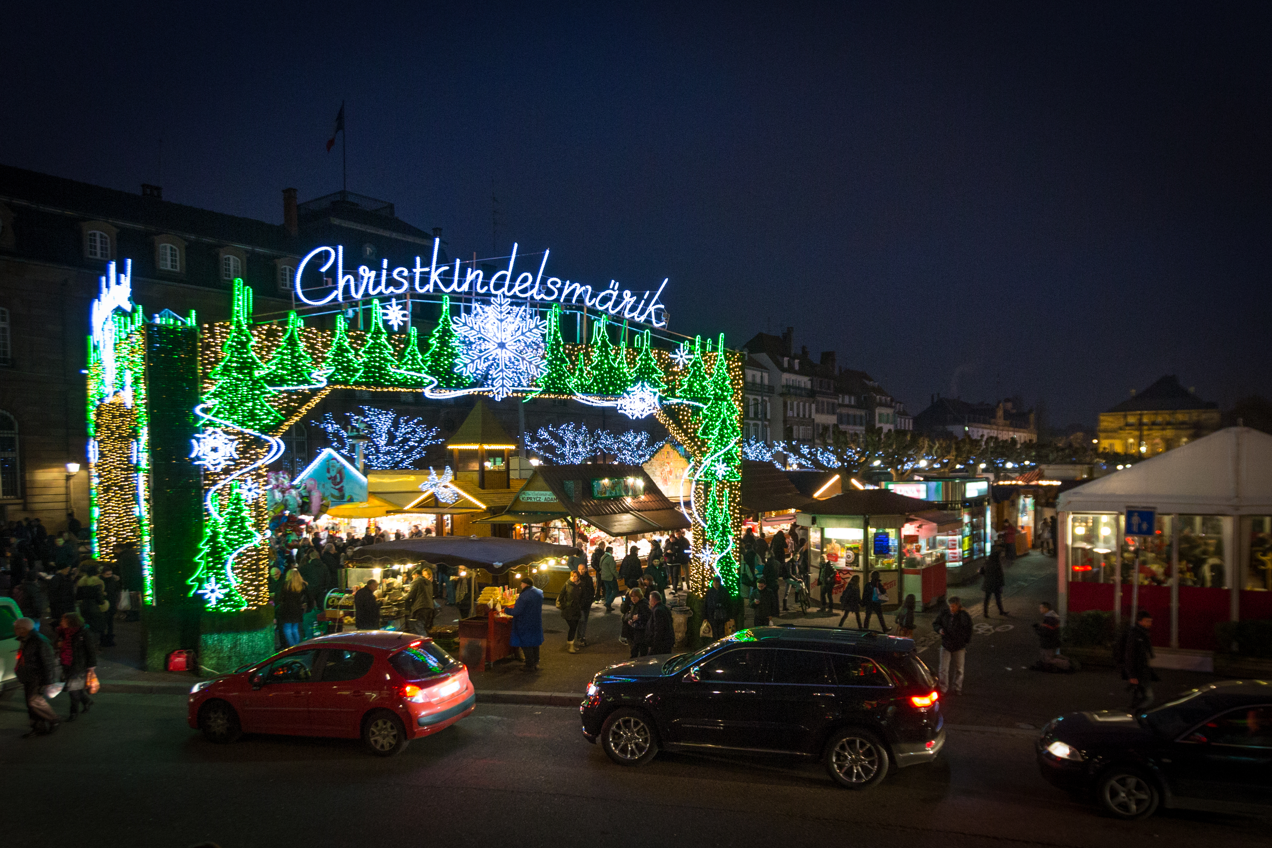 Strasbourg Christkindelsmärik